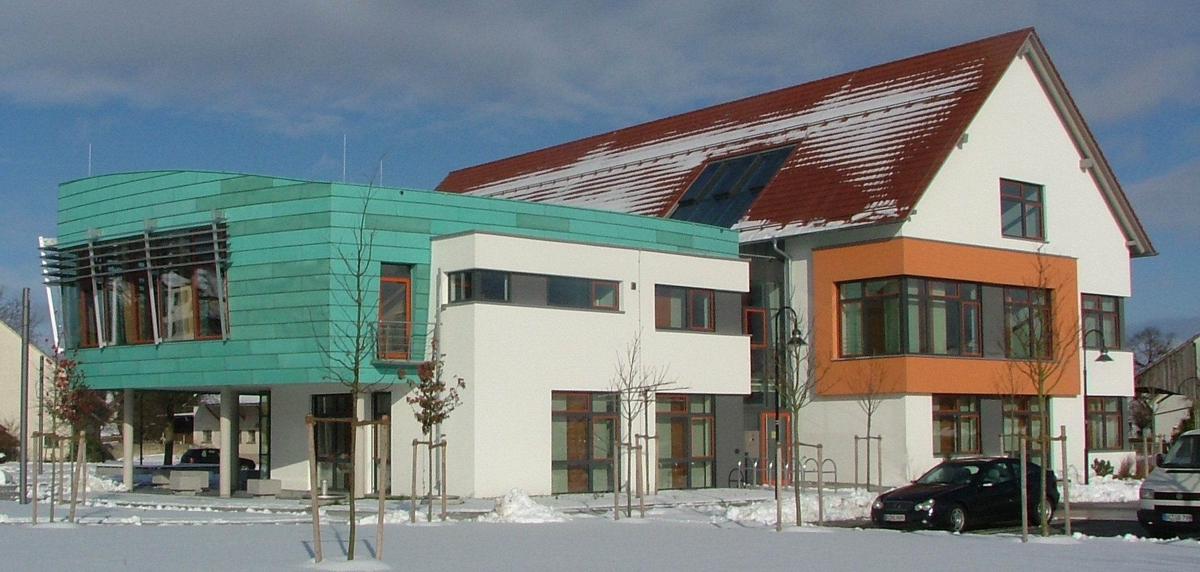 Kirchdorf an der Iller Rathaus